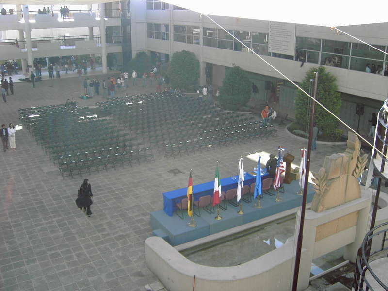 Aufgenommen von Andreas Mayer (Wikipedia-User: G313373)